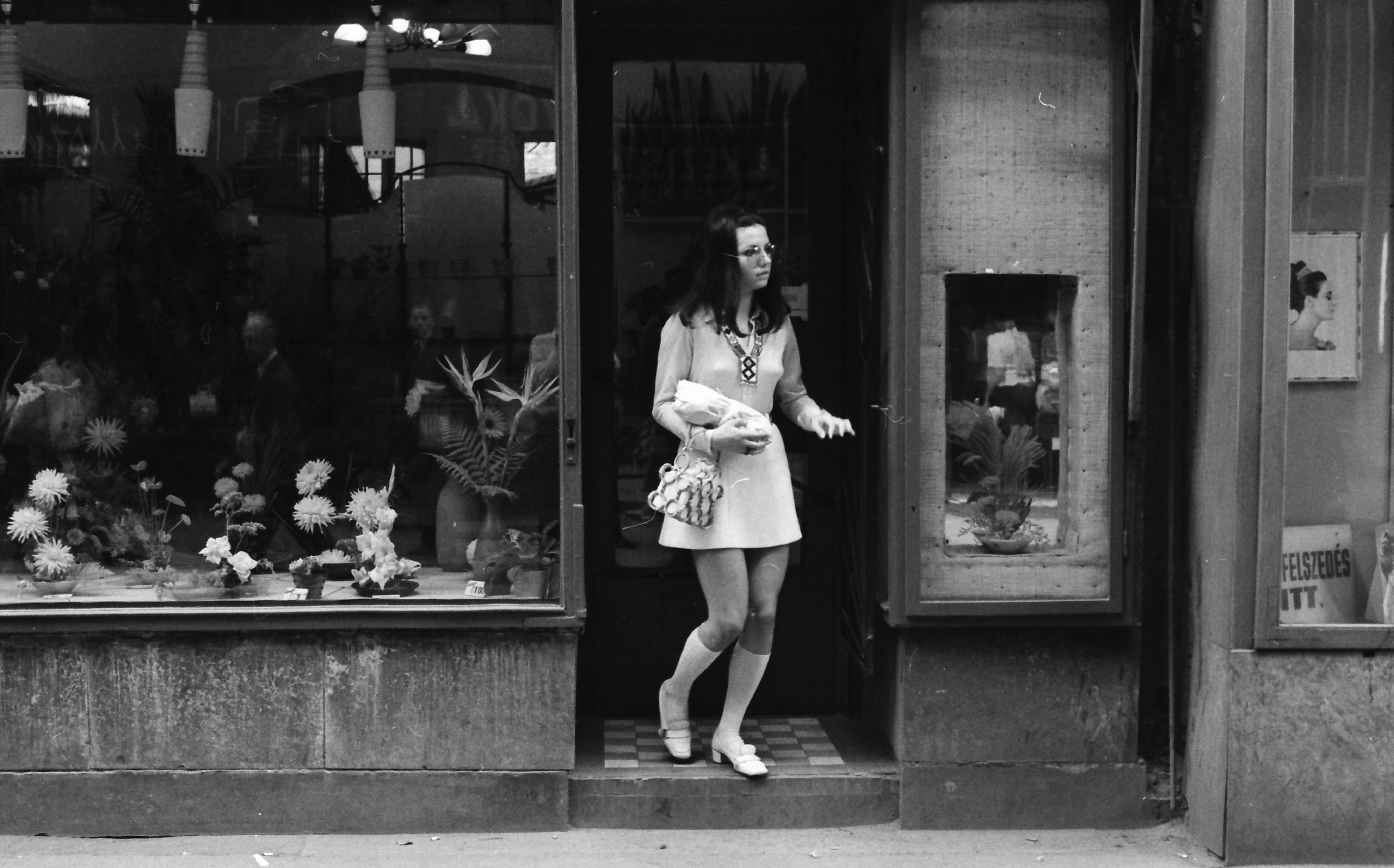 Zalatnay Sarolta magyar énekesnő.